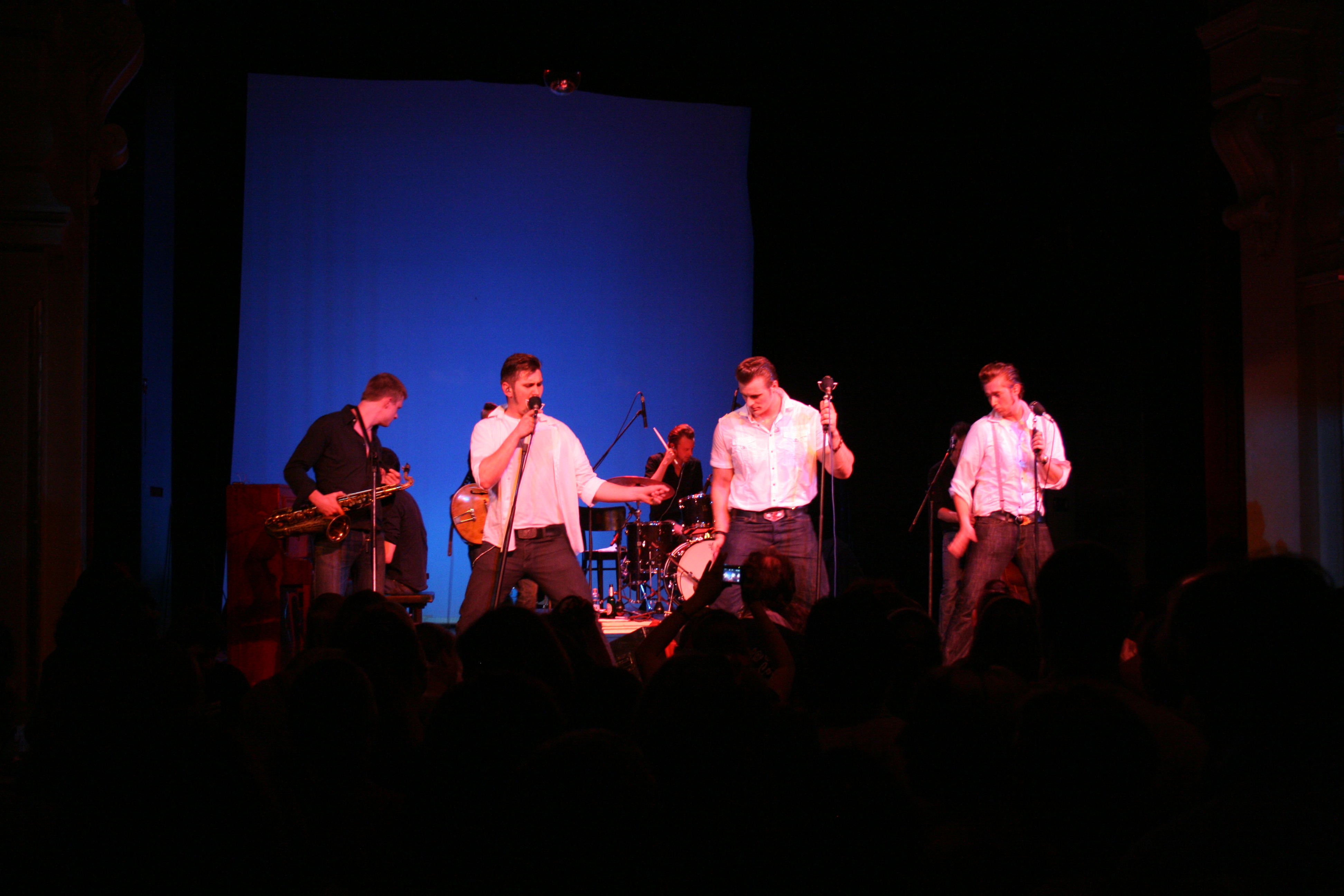 Die Baseballs im Heimathafen Neukölln am 28. Juni 2009. Left to Right - Basti, Sam, Digger